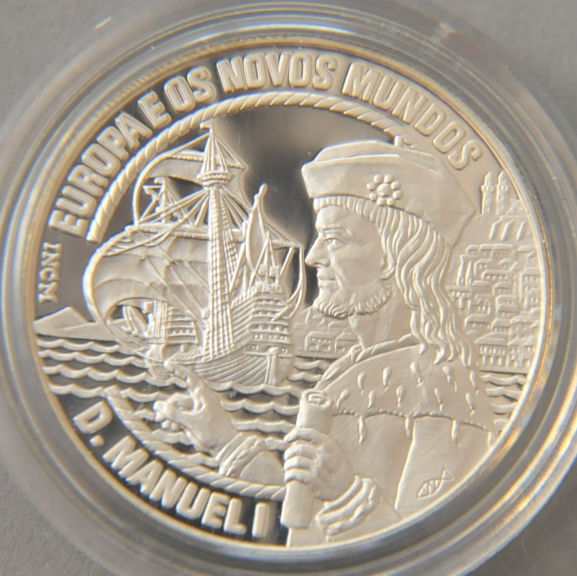 Manuel I. von Portugal, 25-ECU-Münze von 1994, 925er Silber